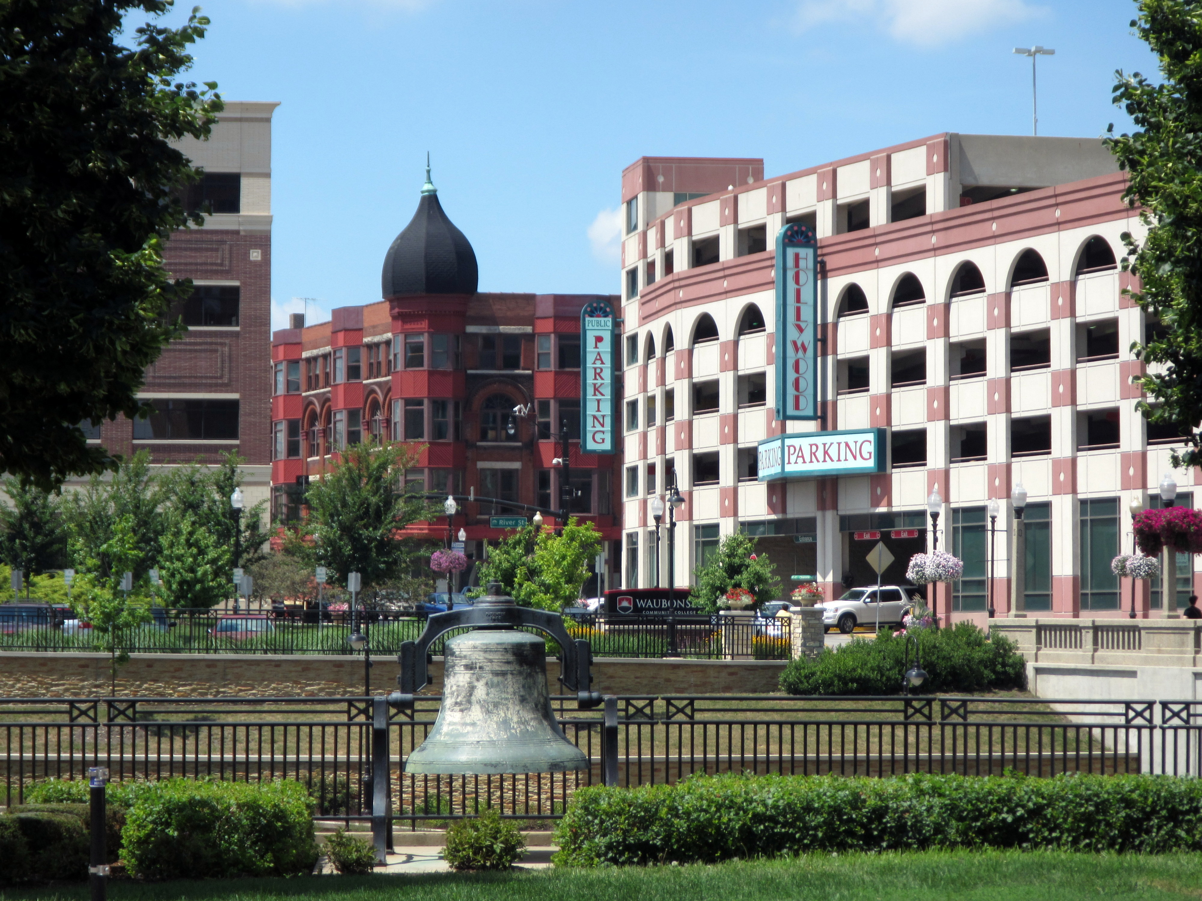 Aurora Millennium Plaza